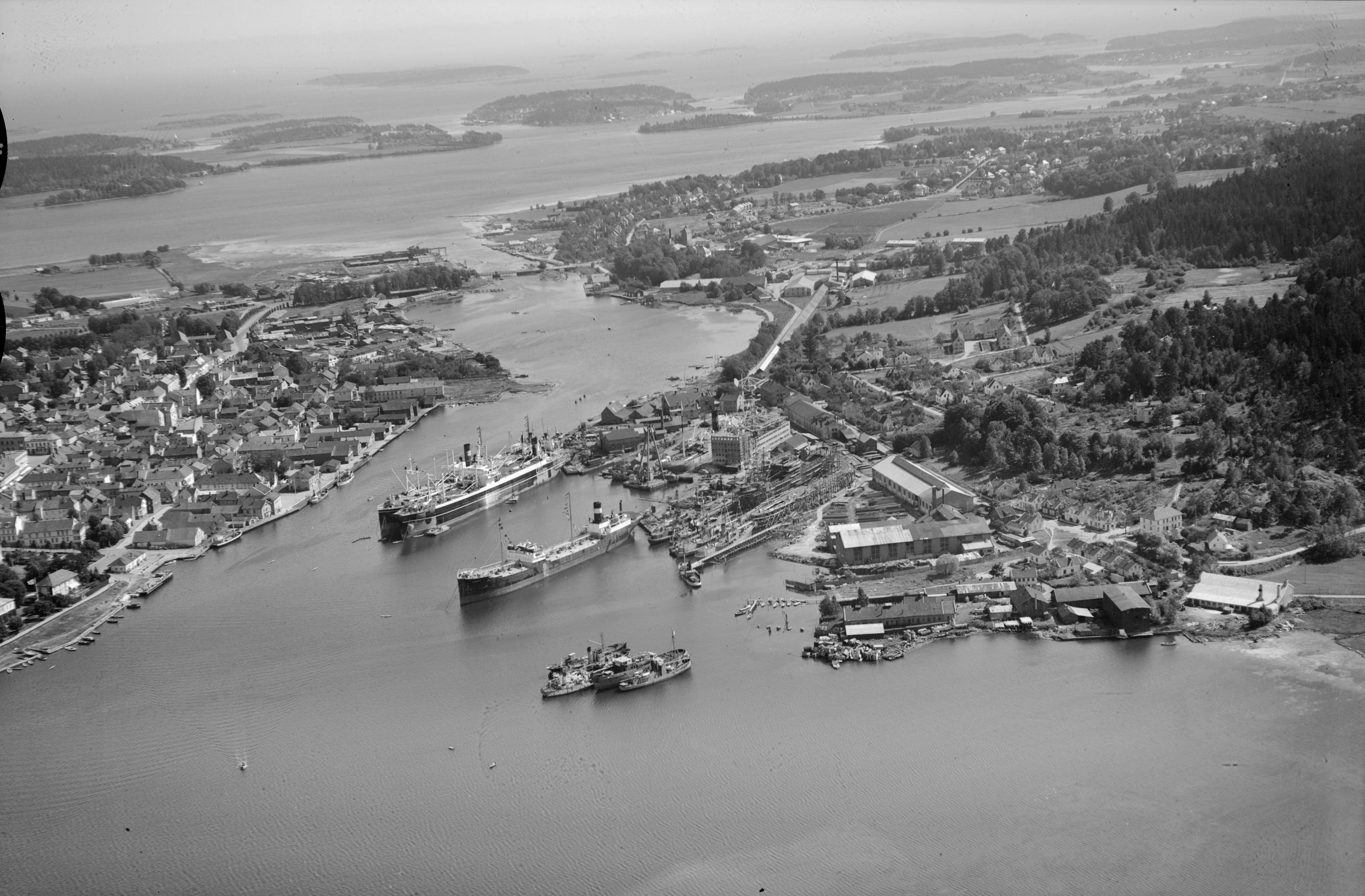 FW.S.A.962